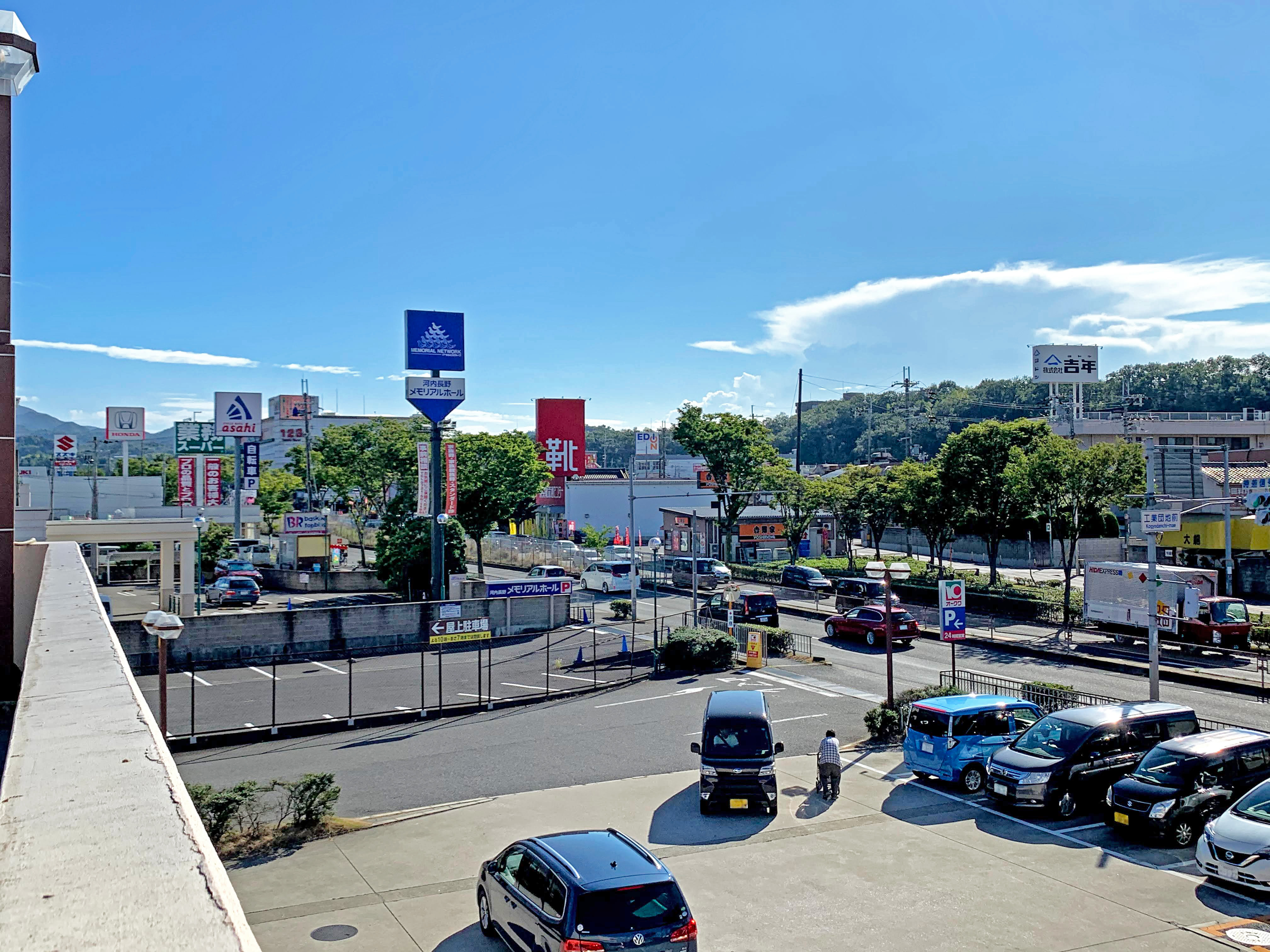 河内長野市の上原町・上原西町の景観